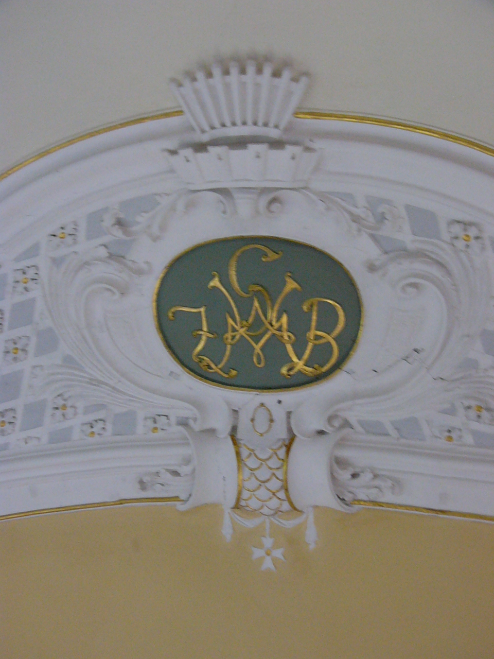 Markgräfliche Insignien im Roten-Adler-Saal in Himmelkron